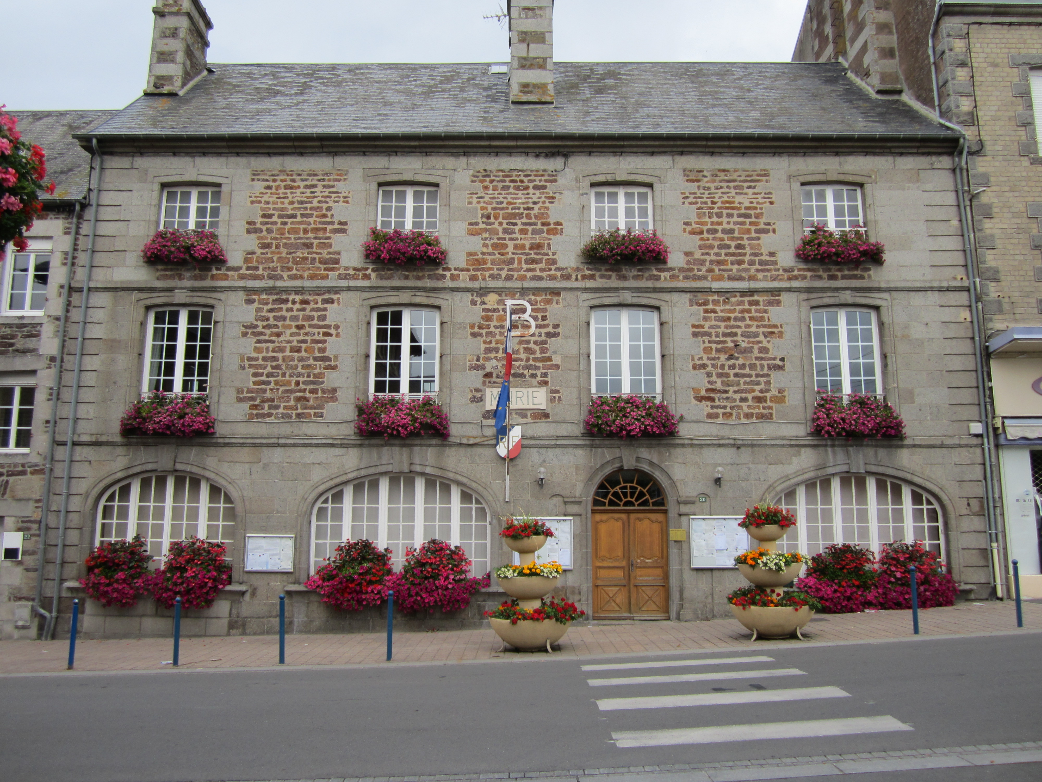 mairie de Bréhal